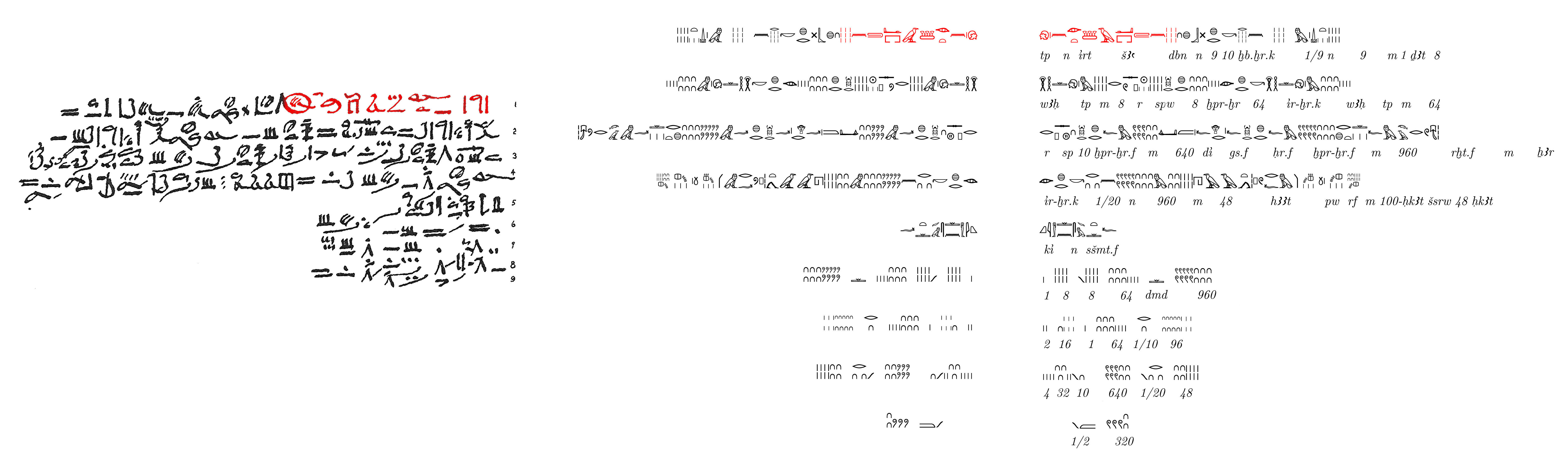 Le problème R41 (d'après Arnold Buffum Chace, The Rhind Mathematical Papyrus: Free Translation and Commentary with Selected Photographs, Translations, Transliterations and Literal Translations, vol. II, 1927-1929)